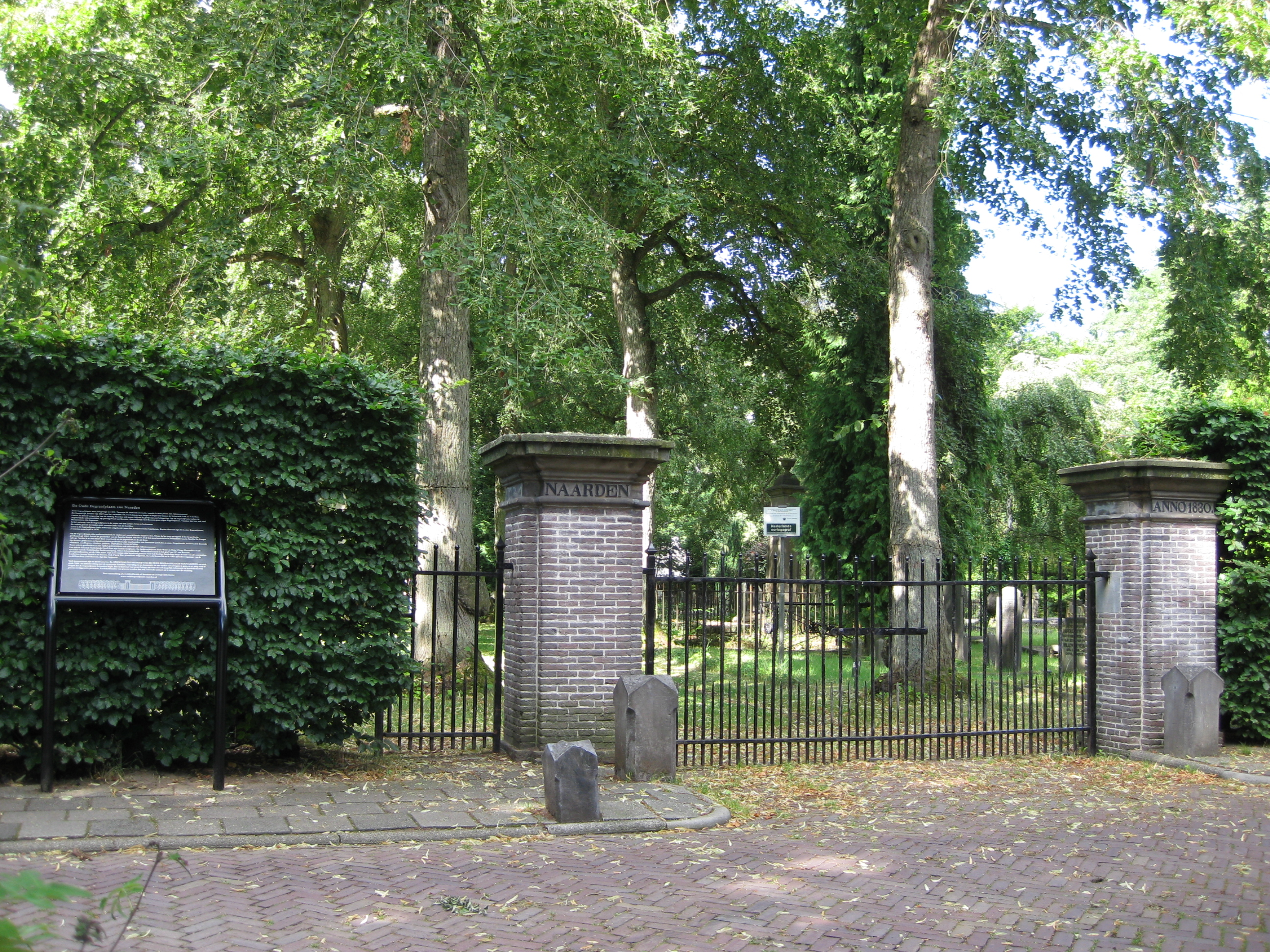 Bussum_Amersfoortsestraatweg_Begraafplaats